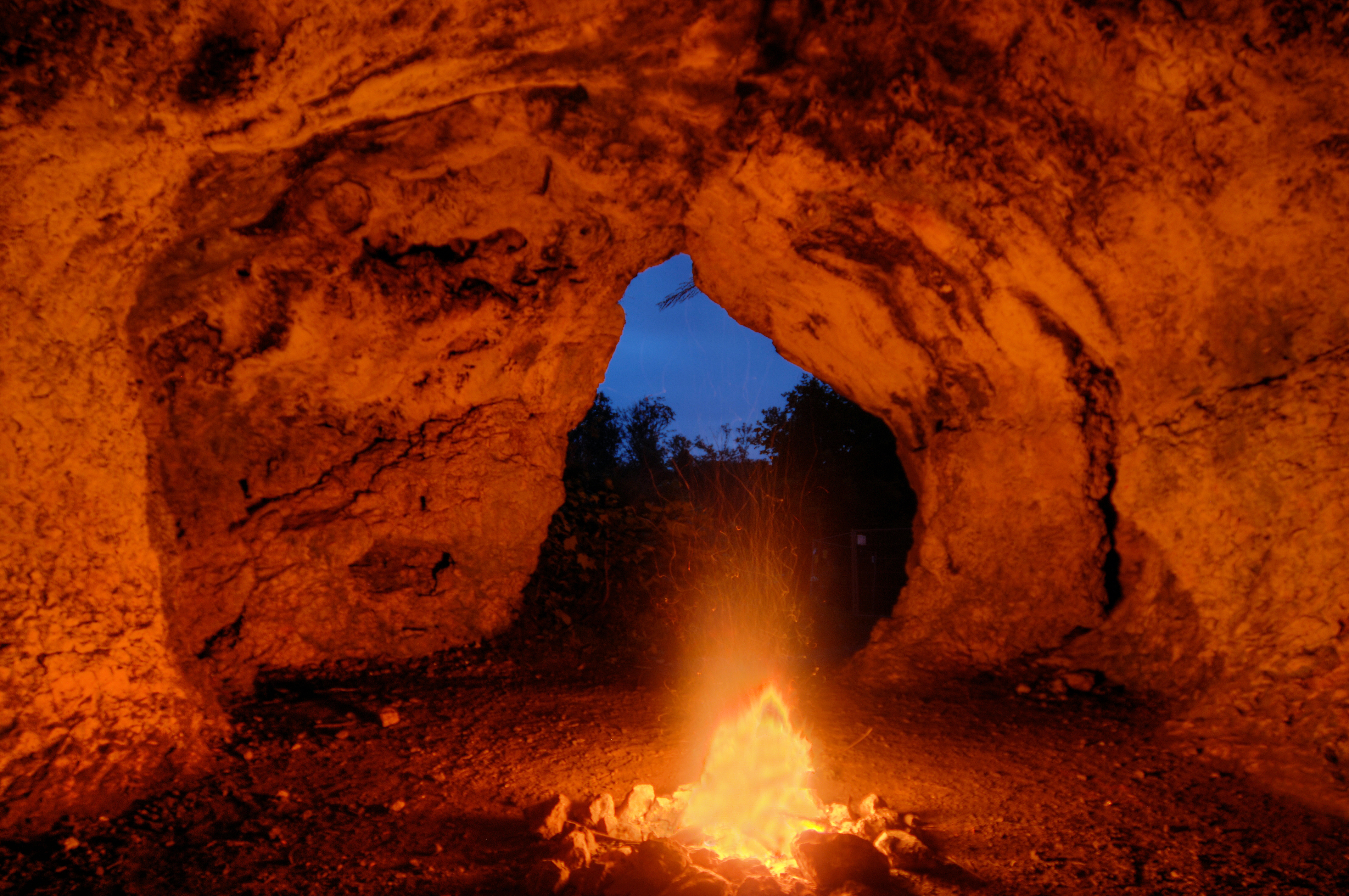 Der Archäopark Vogelherd an der Vogelherdhöhle auf der Schwäbischen Alb.